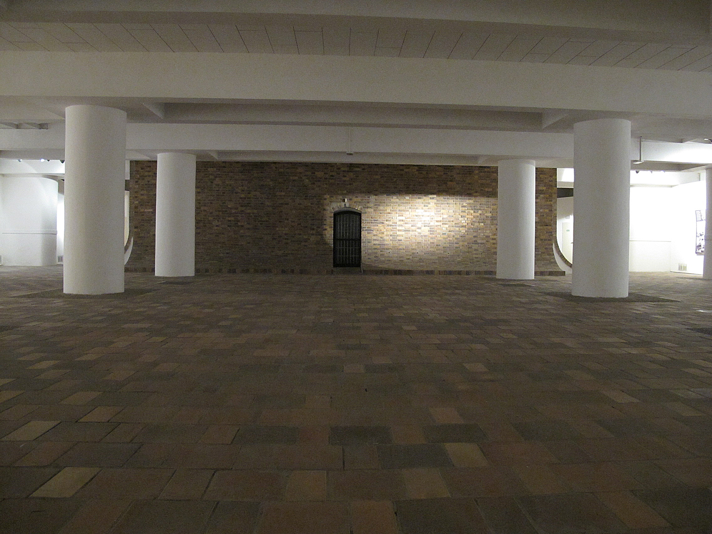 Suterén přesunutého kostela Nanebevzetí Panny Marie v Mostě.